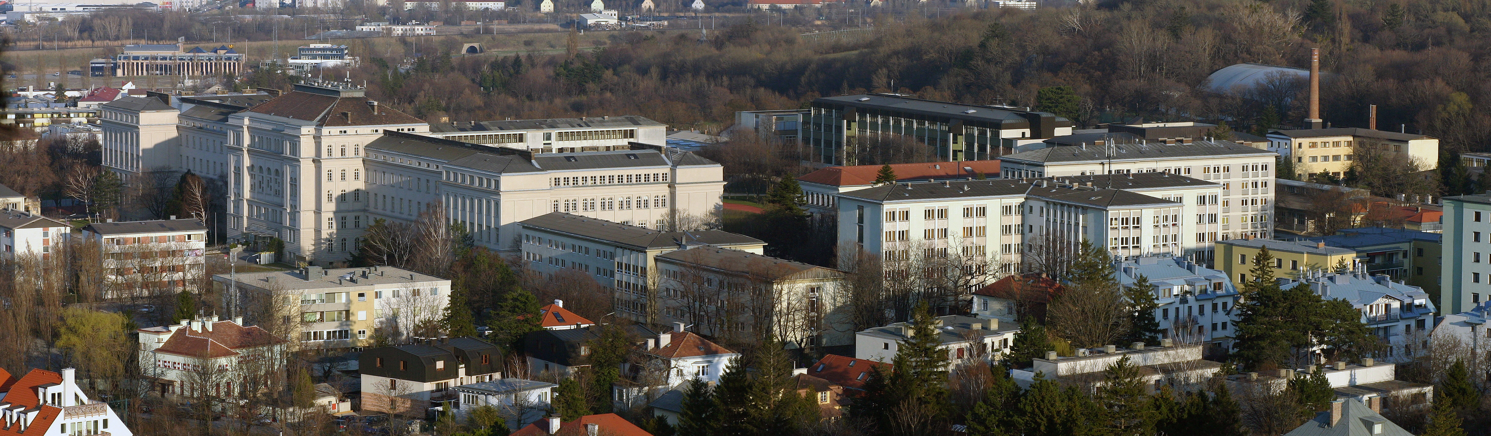 Die HTL Mödling